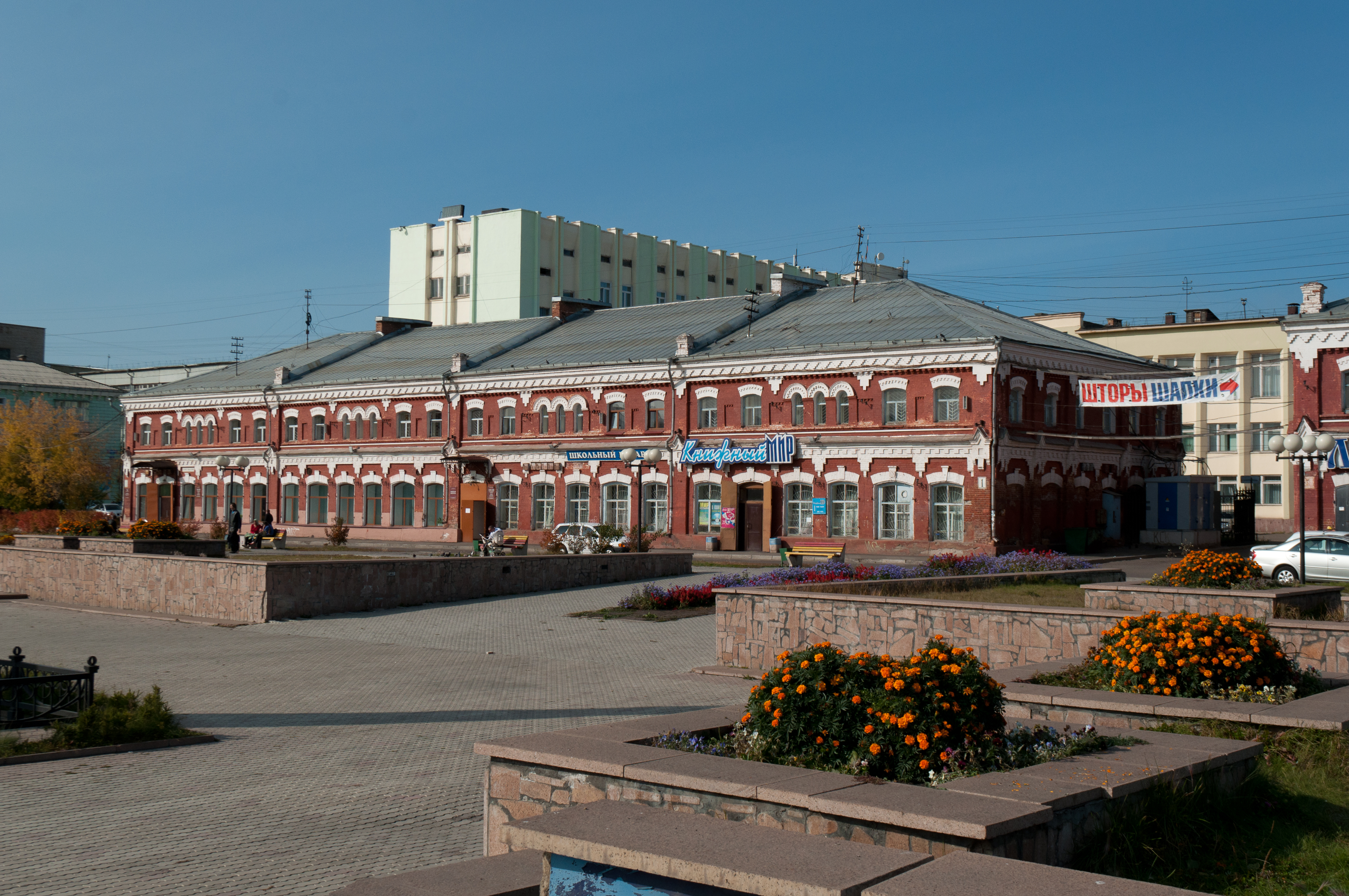 Торговые Дома Чевелева